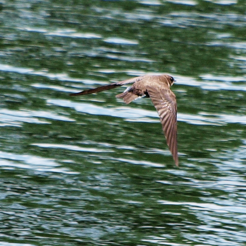 Riparia riparia